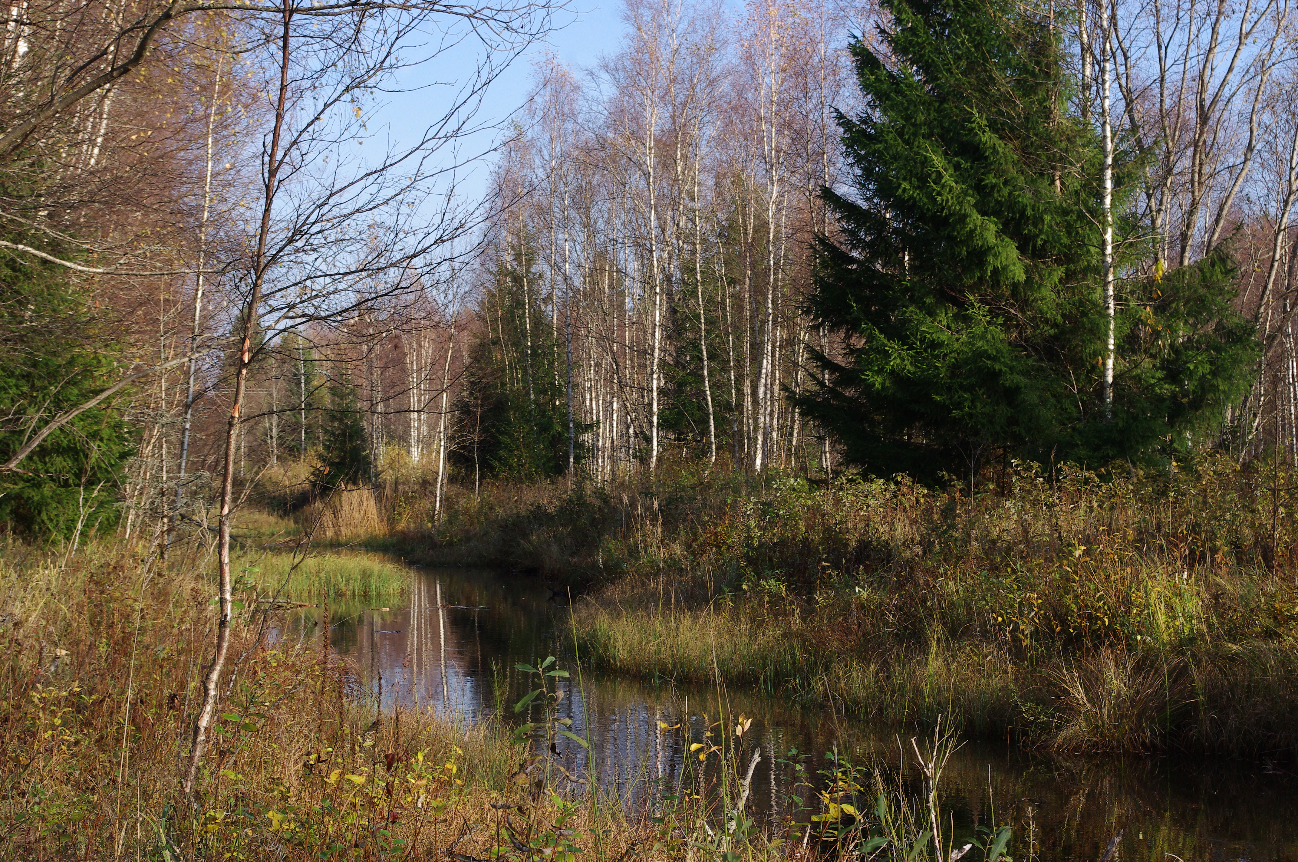 Arapere oja Lehtmetsa külas Albu vallas